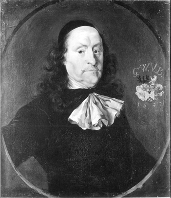 Georg Wilhelm Bidembach von Treuenfels (Tübinger Professorengalerie)